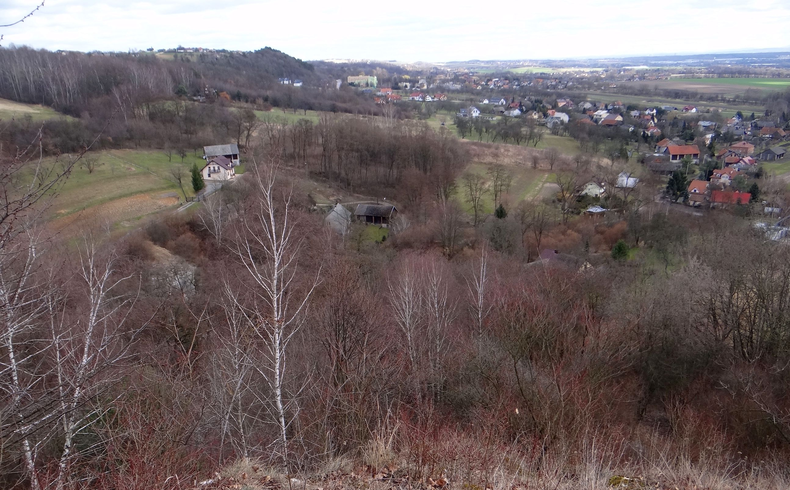 Karniowice i Kobylany. Widok z Kuli